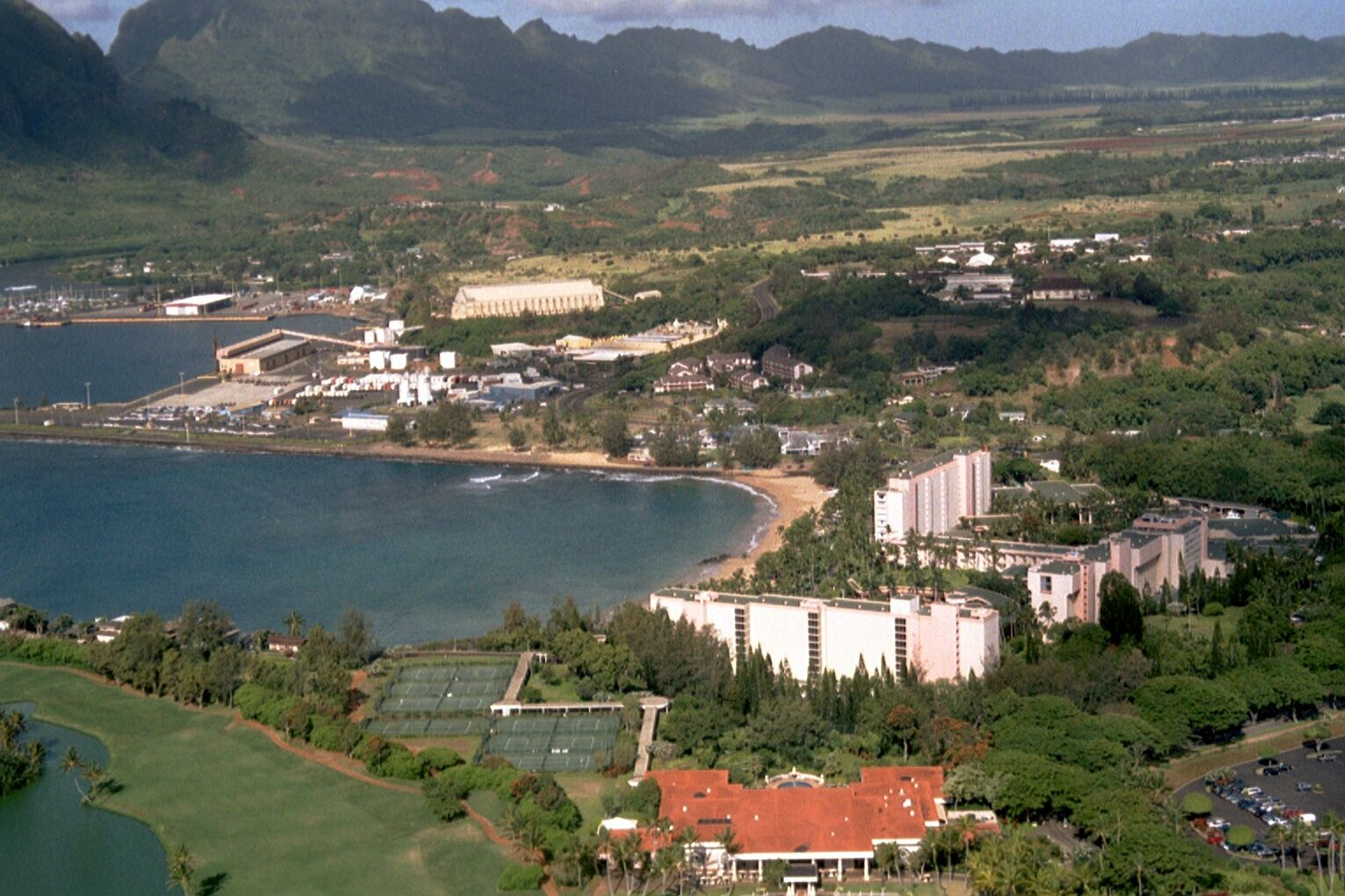 Insel Kauai Lihue